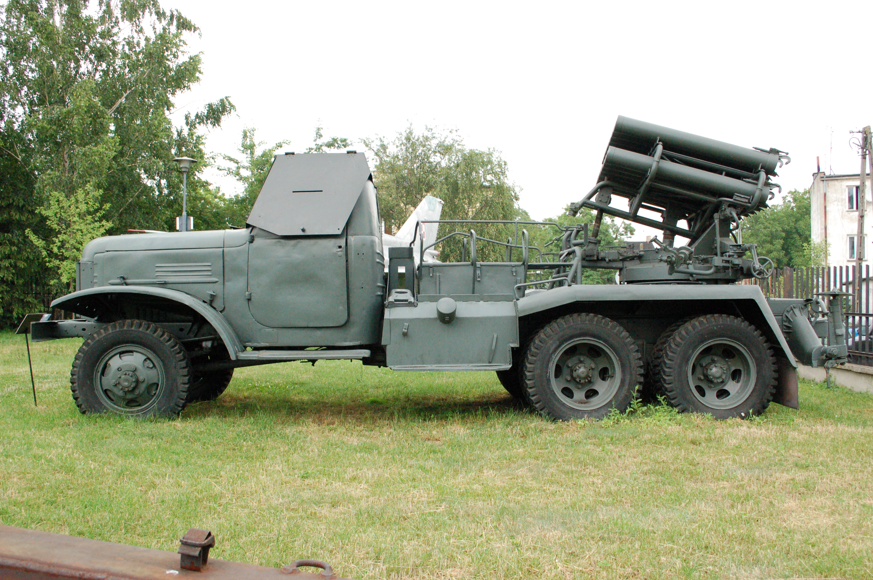 Sochaczew